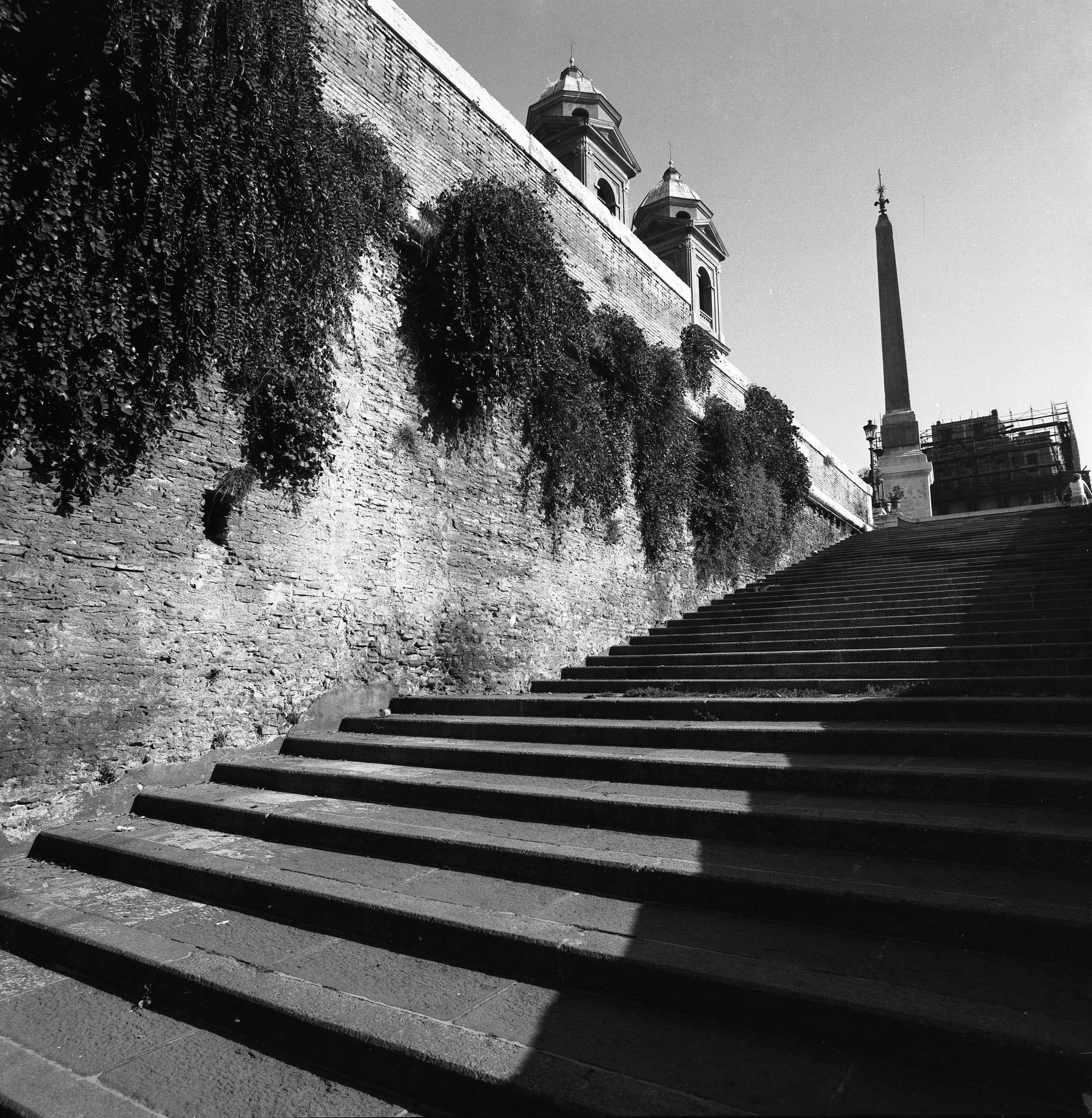 Rampa di San Sebastianello (dalla via di S. Sebastianello alla piazza della Trinità dei Monti)